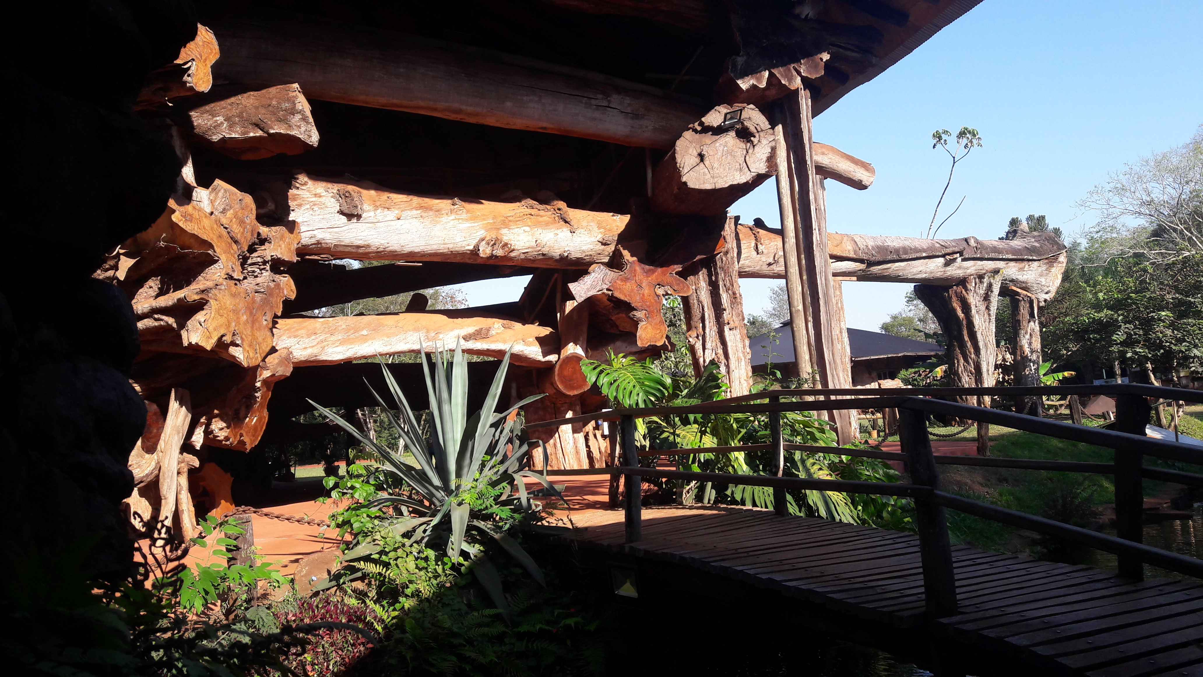 LA ARIPUCA